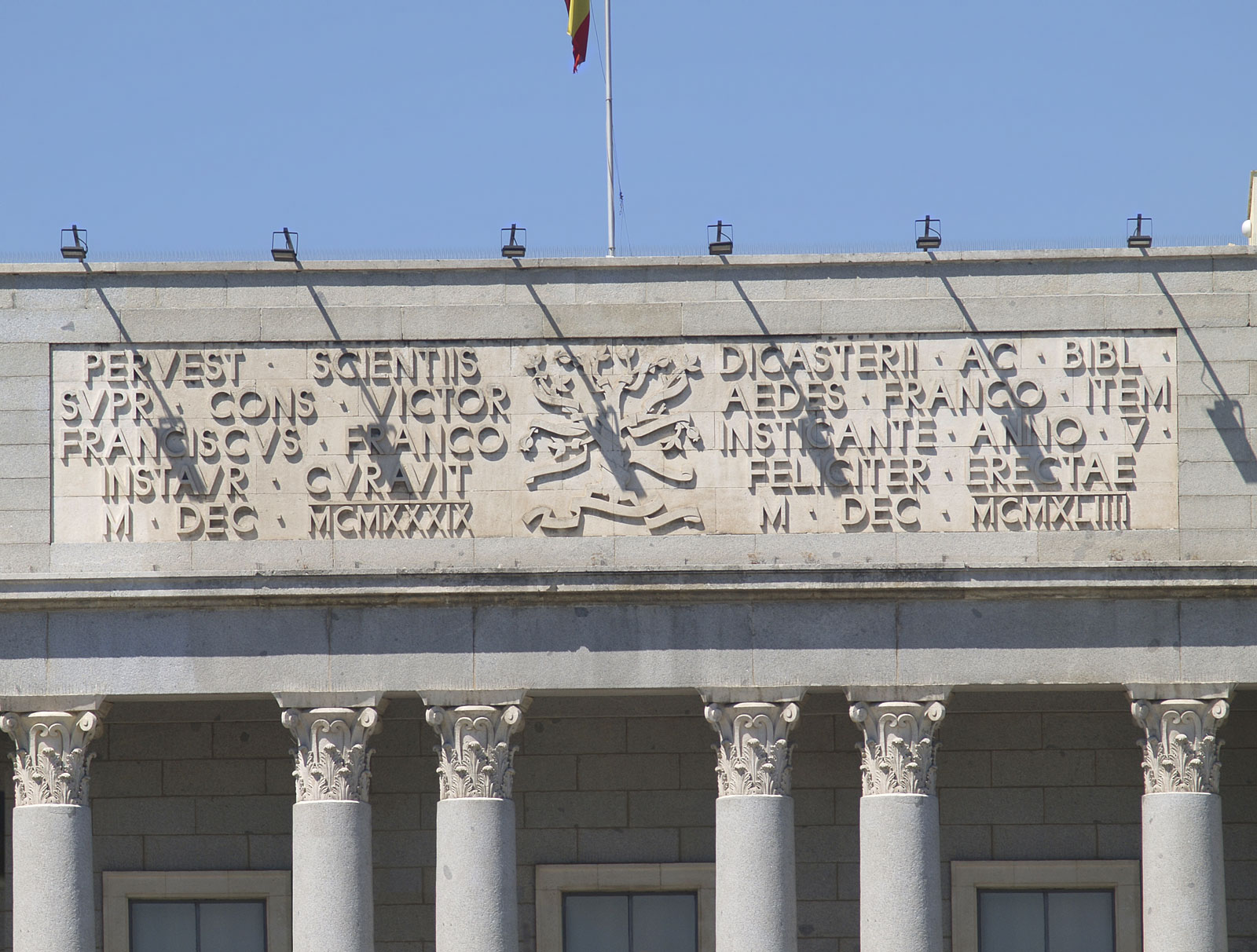 Edificio principal del CSIC. Inscripciones.